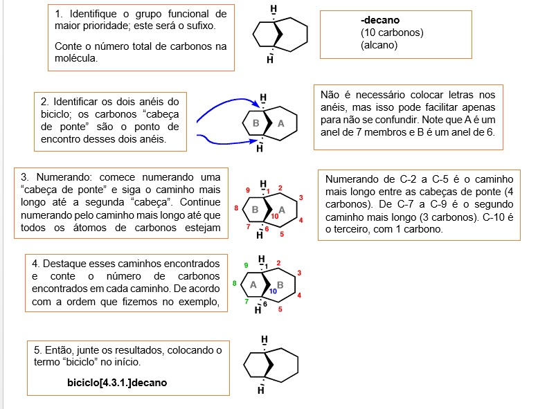 Esquema de nomenclatura para aneis em ponte